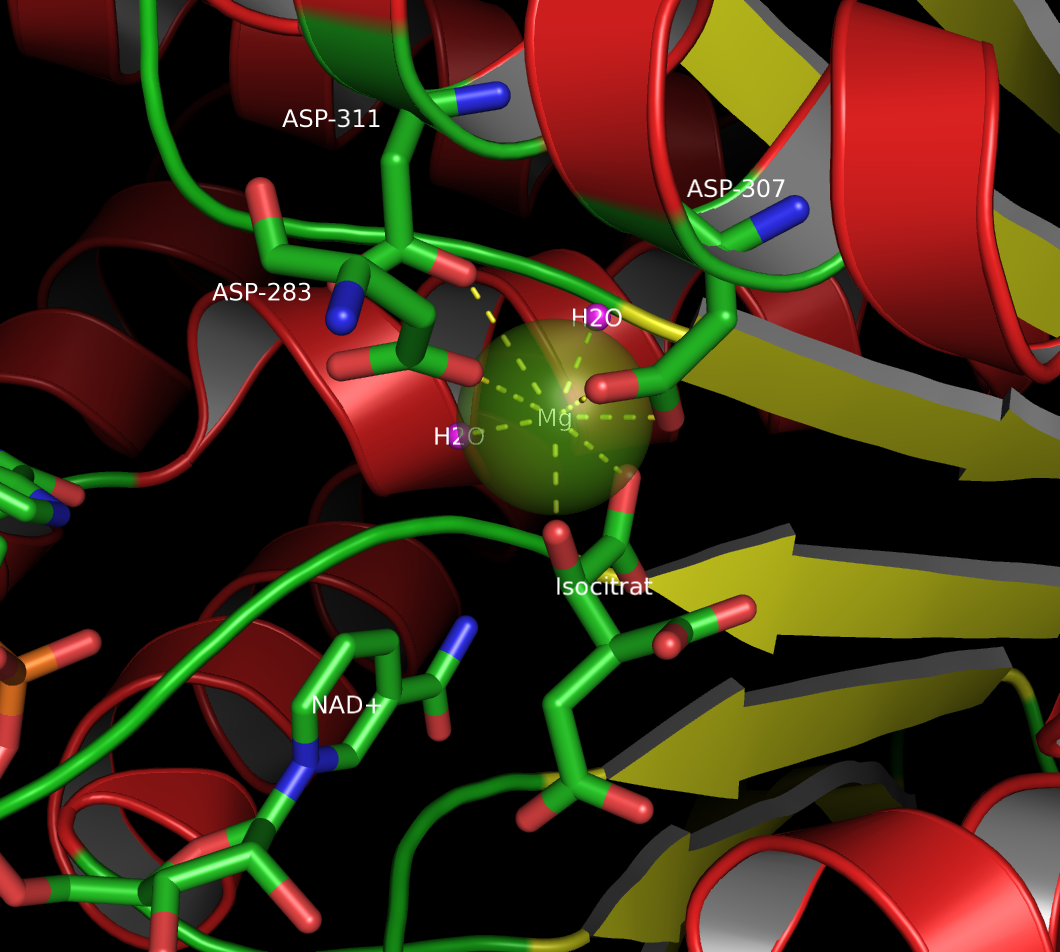 Katalytisches Zentrum der Isocitrat-Dehydrogenase, isoliert aus E. coli Abbildung erstellt aus pdb 1AI3 ( mit pymol 0.99